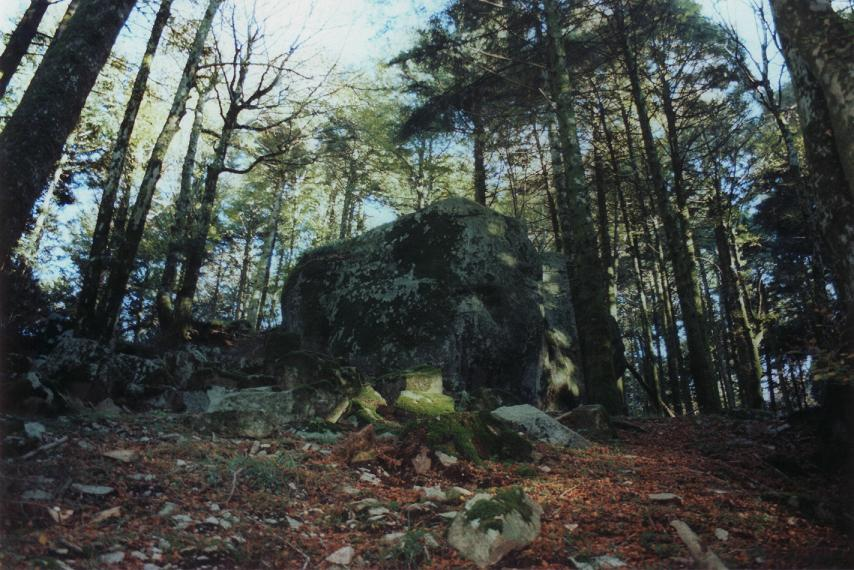 L'incantevole_bellezza_del_Bosco_di_Archiforo_con_la_Pietra_dell'Ammienzo._Serra_San_Bruno._Parco_Naturale_Regionale_delle_Serre